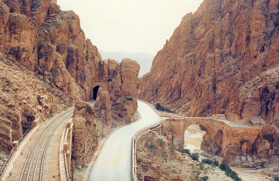 Le Pont romain d'EL-KANTARA LES GORGES (dans la Wilaya de Biskra en Algérie) a été construit au deuxième siècle après J.C. Restauré par les Français en 1862, il existe jusqu'à aujourd'hui.